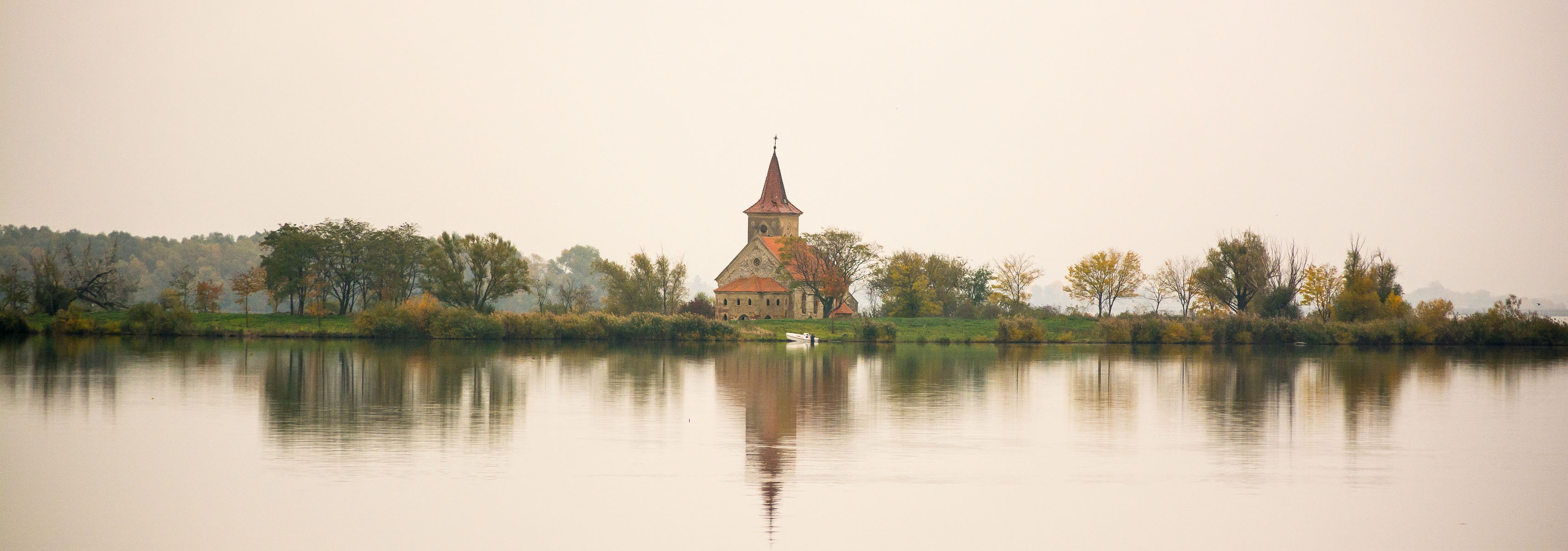 Kostel v Mušově v oblasti zaplavené při vzniku vodního díla Nové mlýny